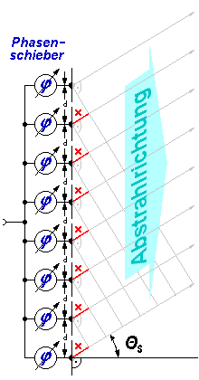 Betriebsdiagramm eines Mehrfach -Sender, in dem die Phasendifferenz zwischen den Sendern verwendet wird, um das Programm zu lenken.